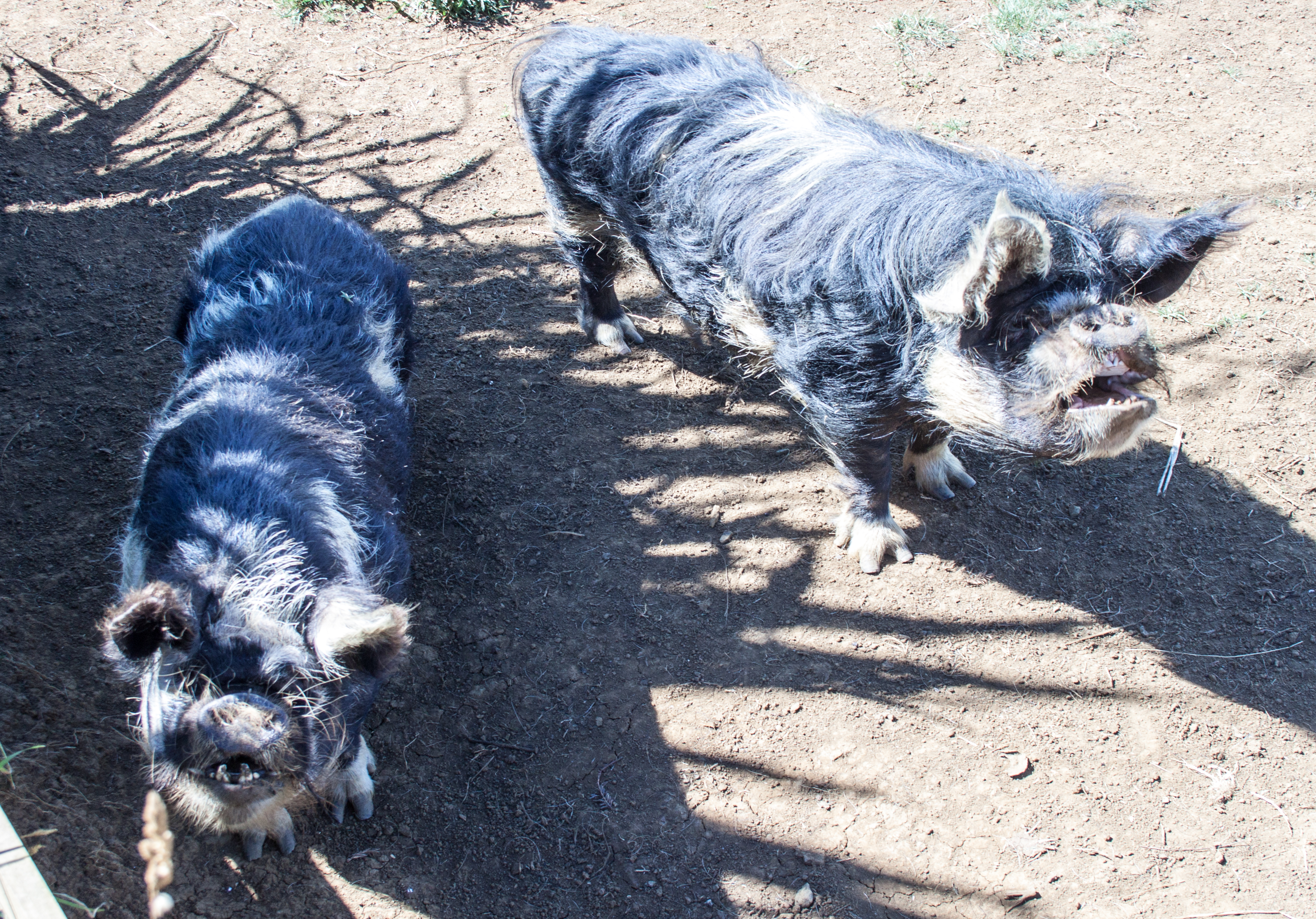 Kunekune pigs